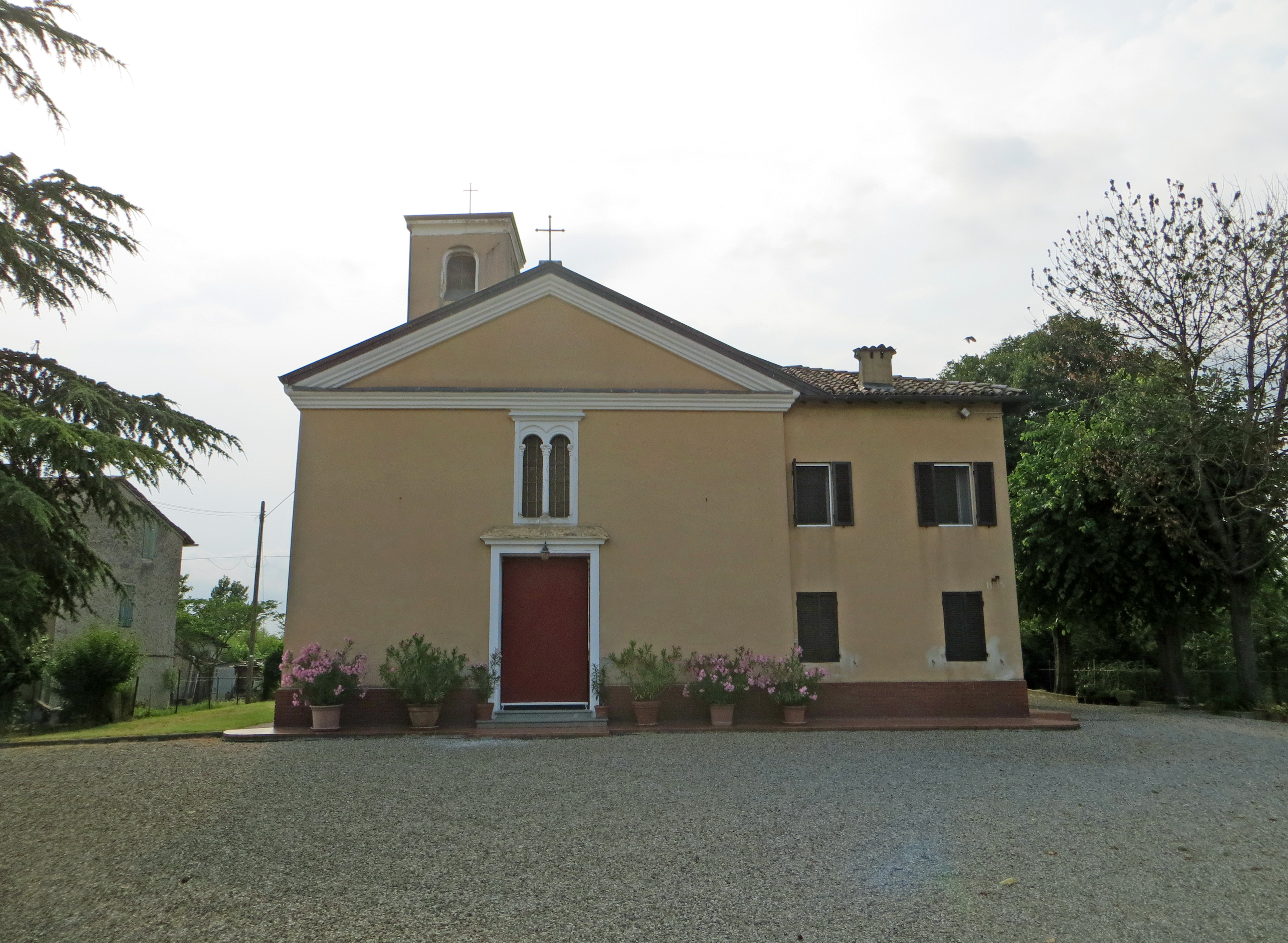 Chiesa della Purificazione di Maria Vergine (Beneceto, Parma) - facciata